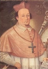 Matouš Ferdinand Sobek z Bílenberka (1618 - 1675), Benediktinský mnich, opat, biskup a arcibiskup.